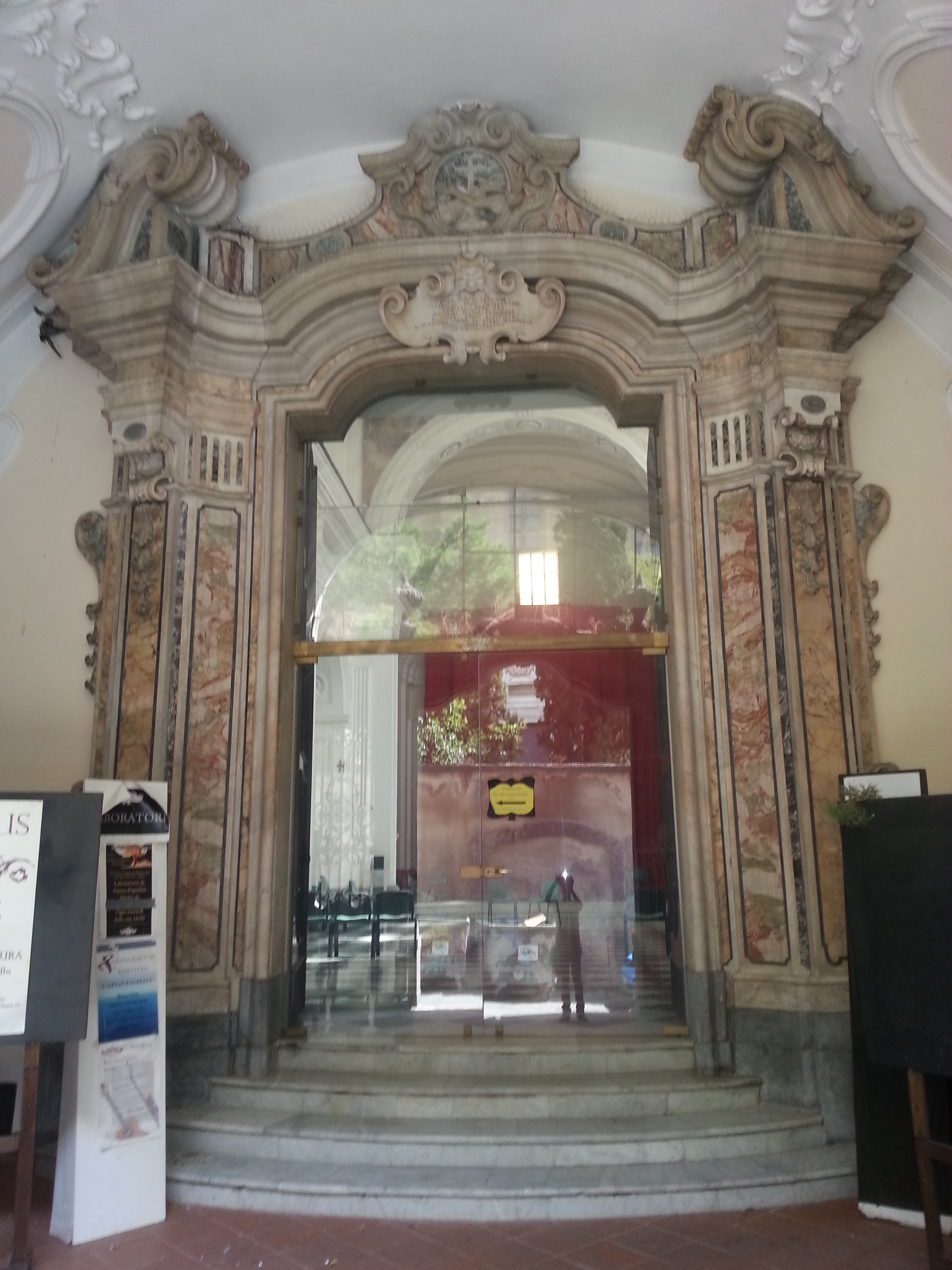 Il portale del Torchese